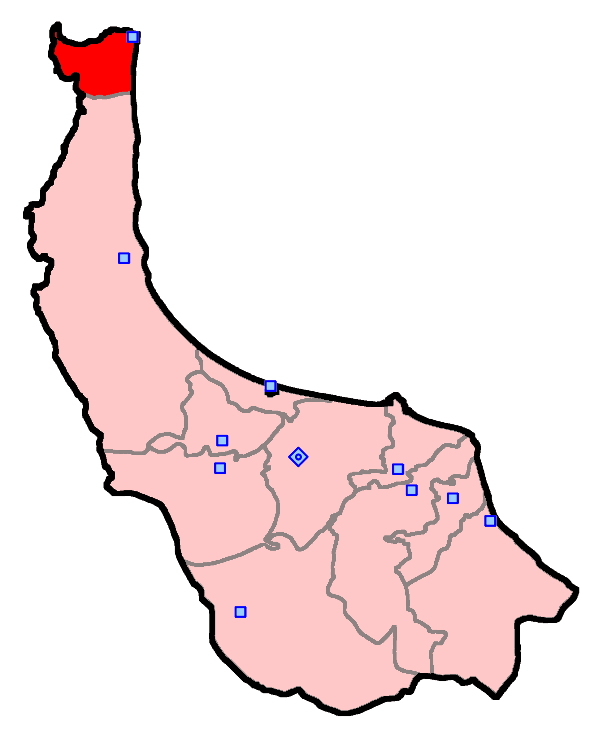 آستارا برای انتخابات مجلس شورای اسلامی